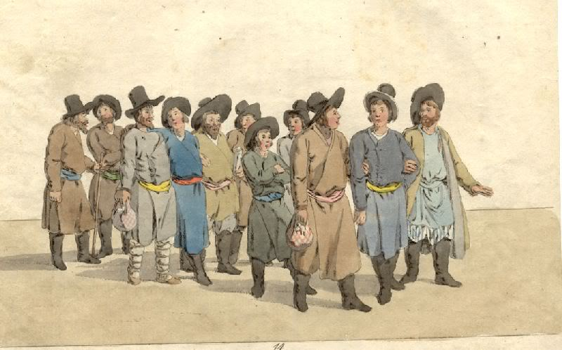 Жених по дороге в баню накануне свадьбы (Группа мужчин, держащих друг друга под руки).